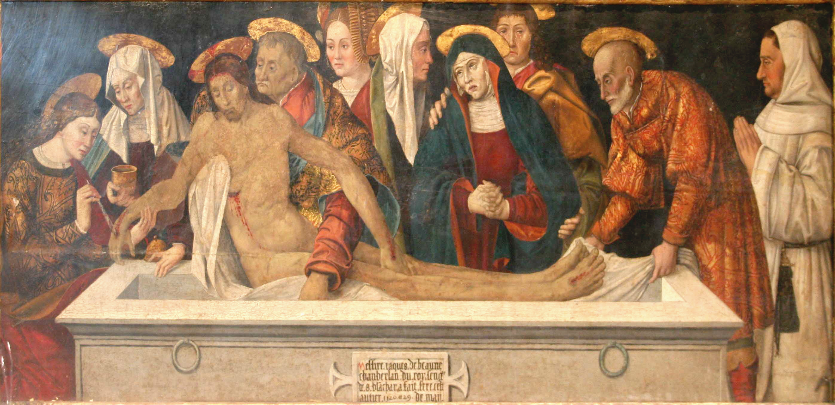 Rétable de la crucifixion du Christ montrant la mise au tombeau du Christ. Tableau réalisé par Antoine Ronzen de l'école vénitienne assisté d'Antoine Brea